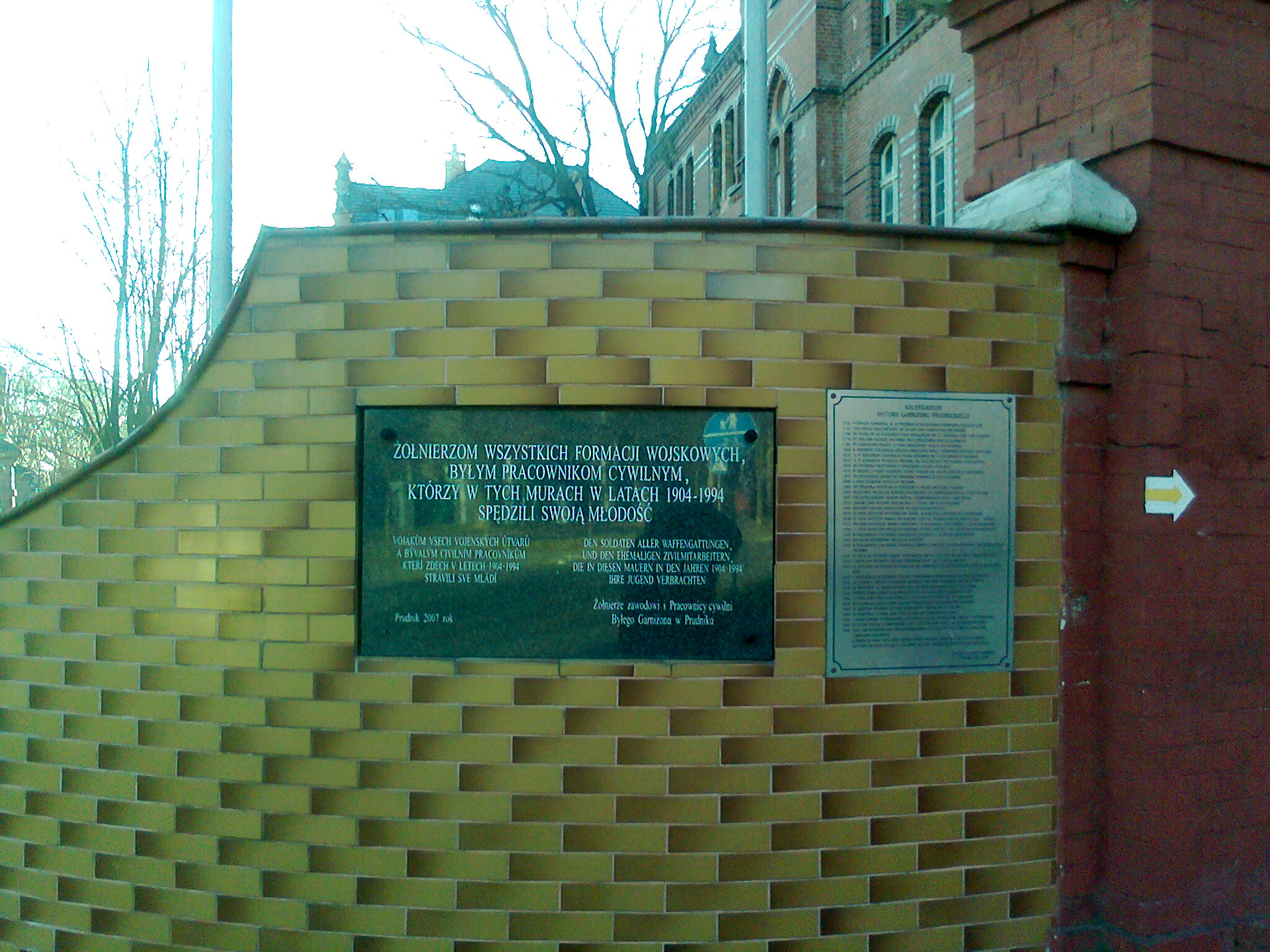 Prudnik, tablica pamiątkowa i kalendarium garnizonu Prudnik przy bramie wjazdowej do byłych wojskowych koszar, na skrzyżowaniu ulic Dąbrowskiego i Legionów